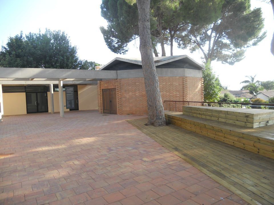 Beit Terezín 2012- nově zrekonstruovaný dvůr